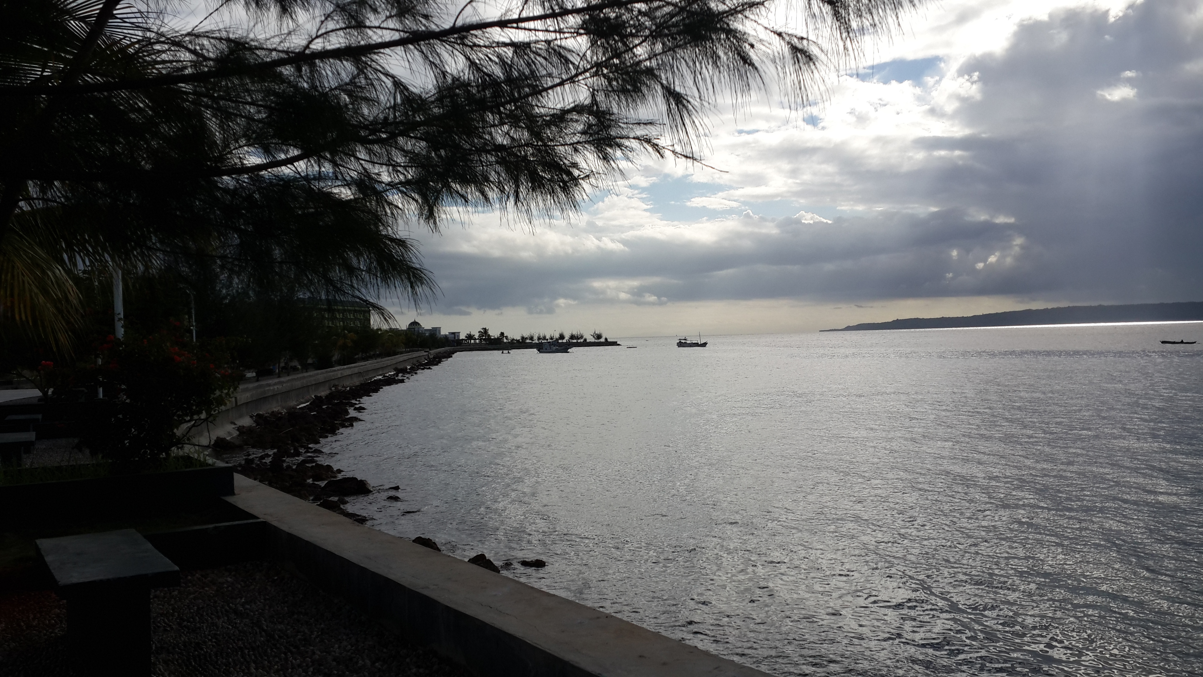 Bau-bau, Bau-Bau City, South East Sulawesi, Indonesia